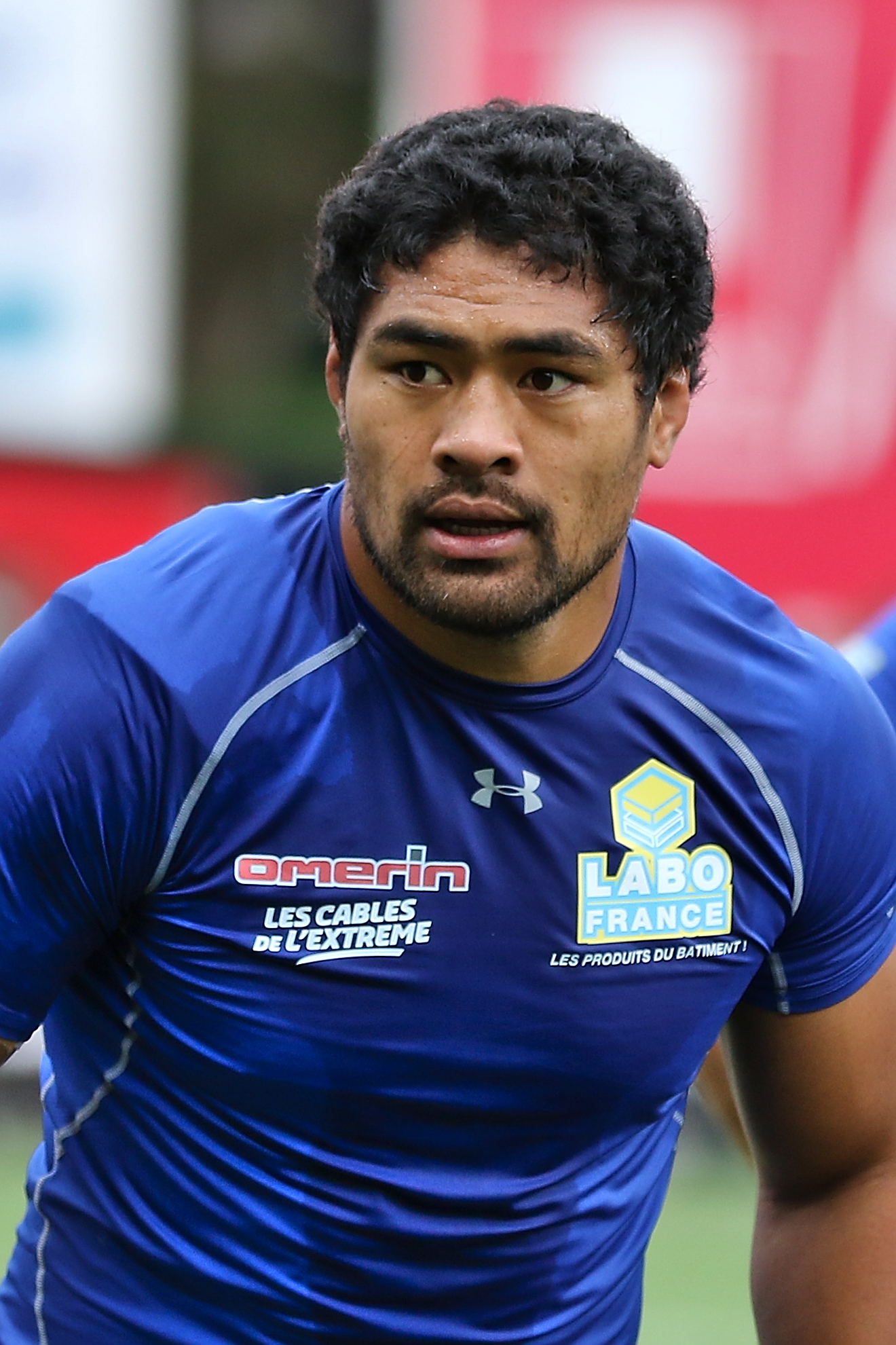 USO - ASM - 20150905 - Fritz Lee